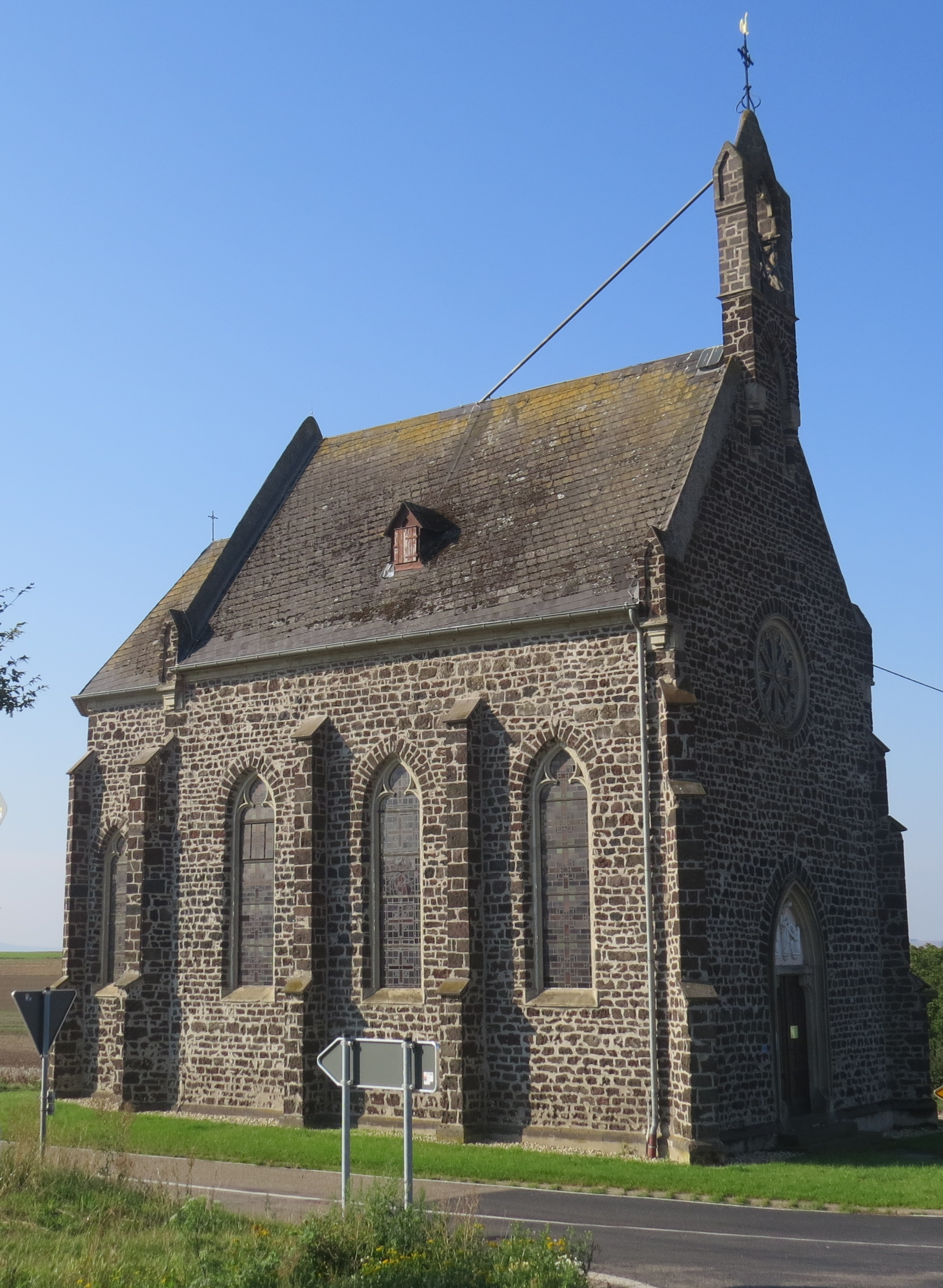 Außenansicht